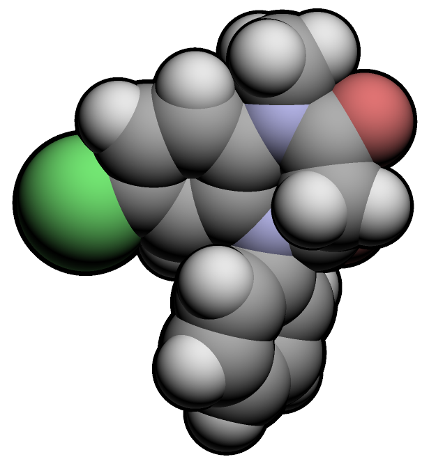 Molecular spacefill of Clobazam